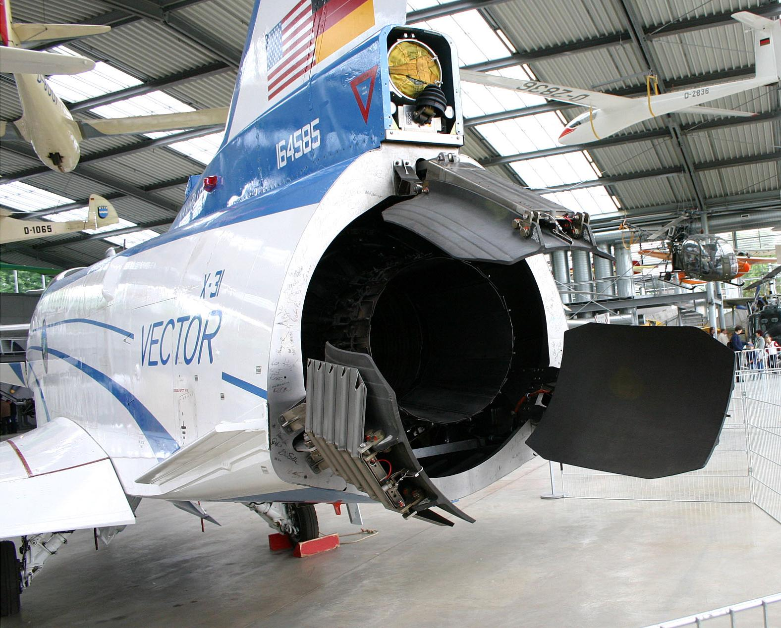 X-31